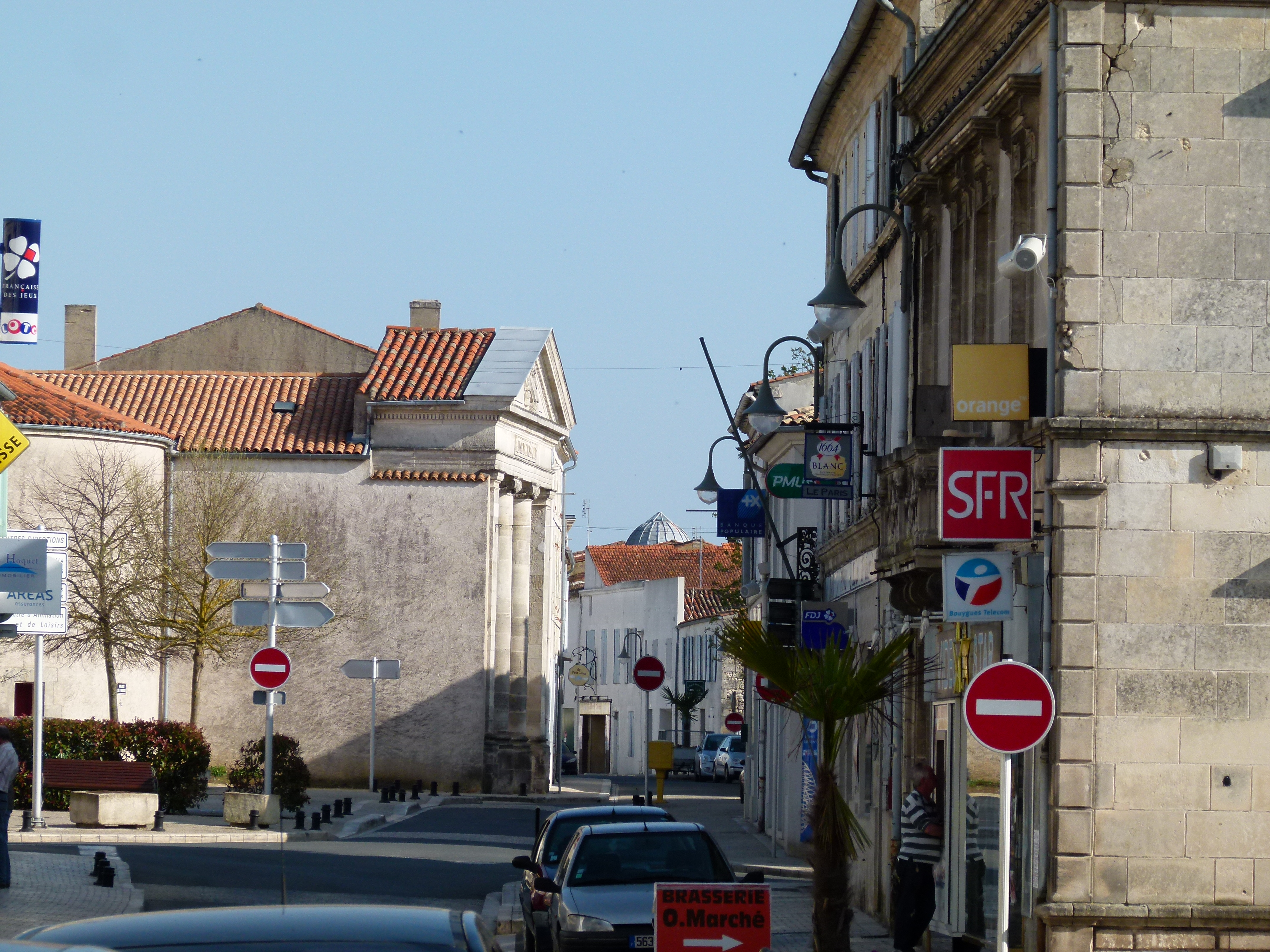 Une rue du centre ville de Marennes (17) avec au fond à gauche le temple de l'église réformée de la ville.